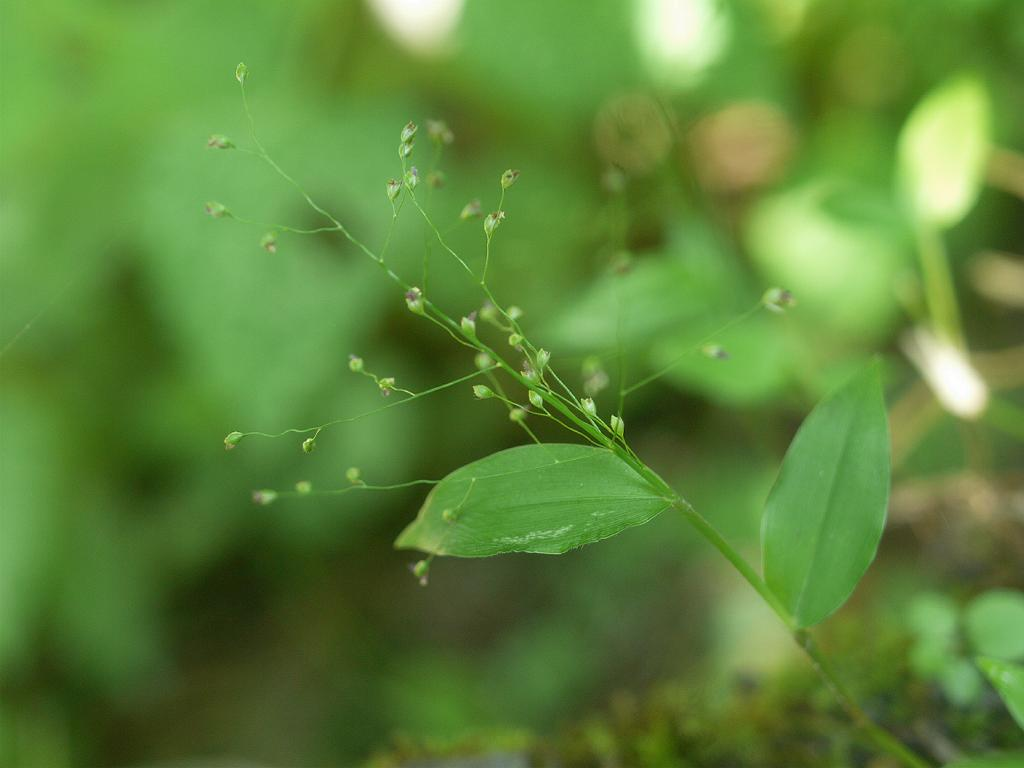 Isachne nipponensis：ハイチゴザサ 2008/09/27 和歌山県田辺市：Tanabe City. Wakayama Pref. Japan